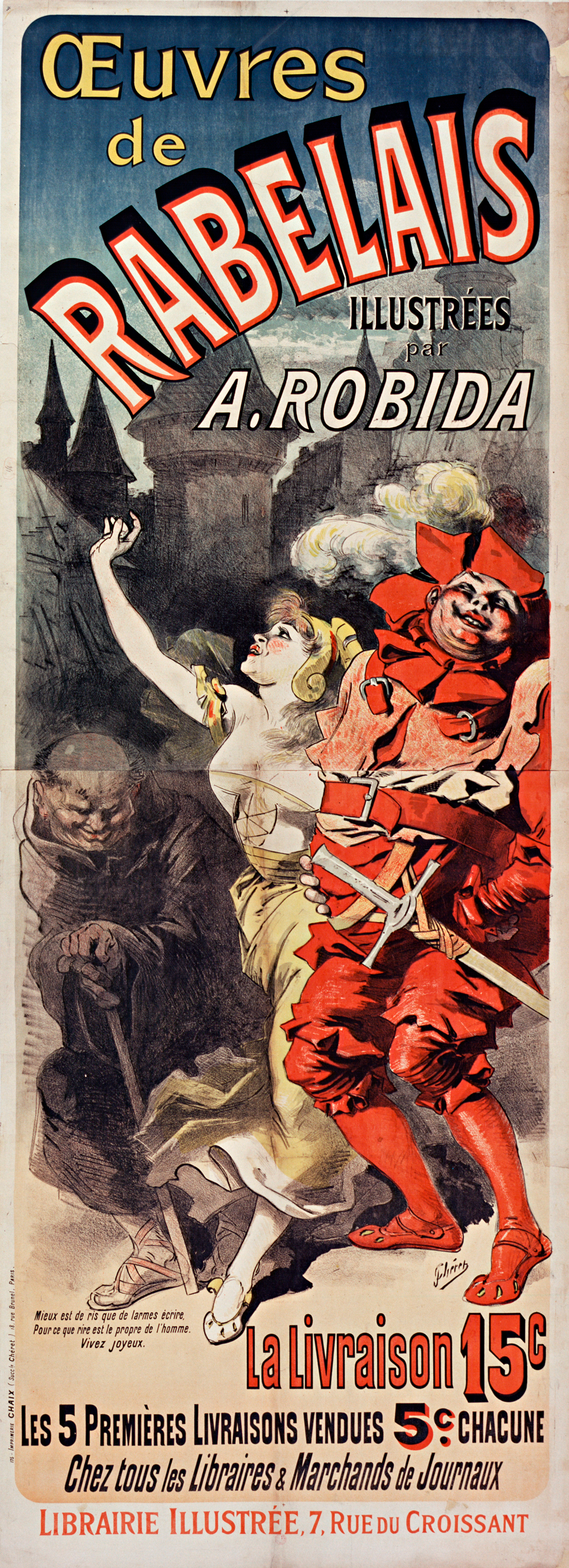 Publicité de 1885 (231 x 82 cm) de la Librairie Illustrée pour les Œuvres de Rabelais illustrées par A. Robida. Illustration par Jules Chéret.